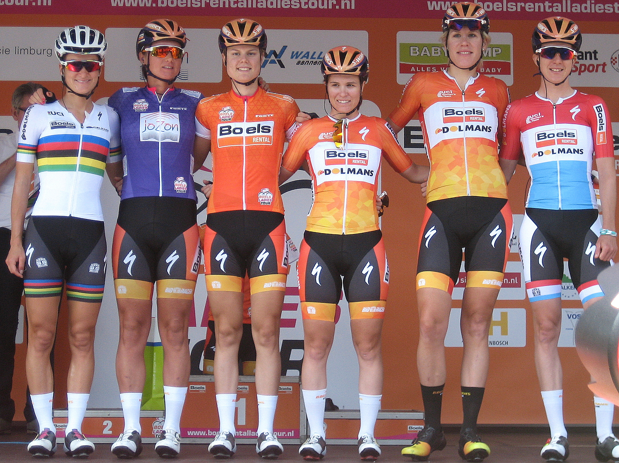 Team Boels Dolmans voor start 3e etappe Holland Ladies Tour 2016